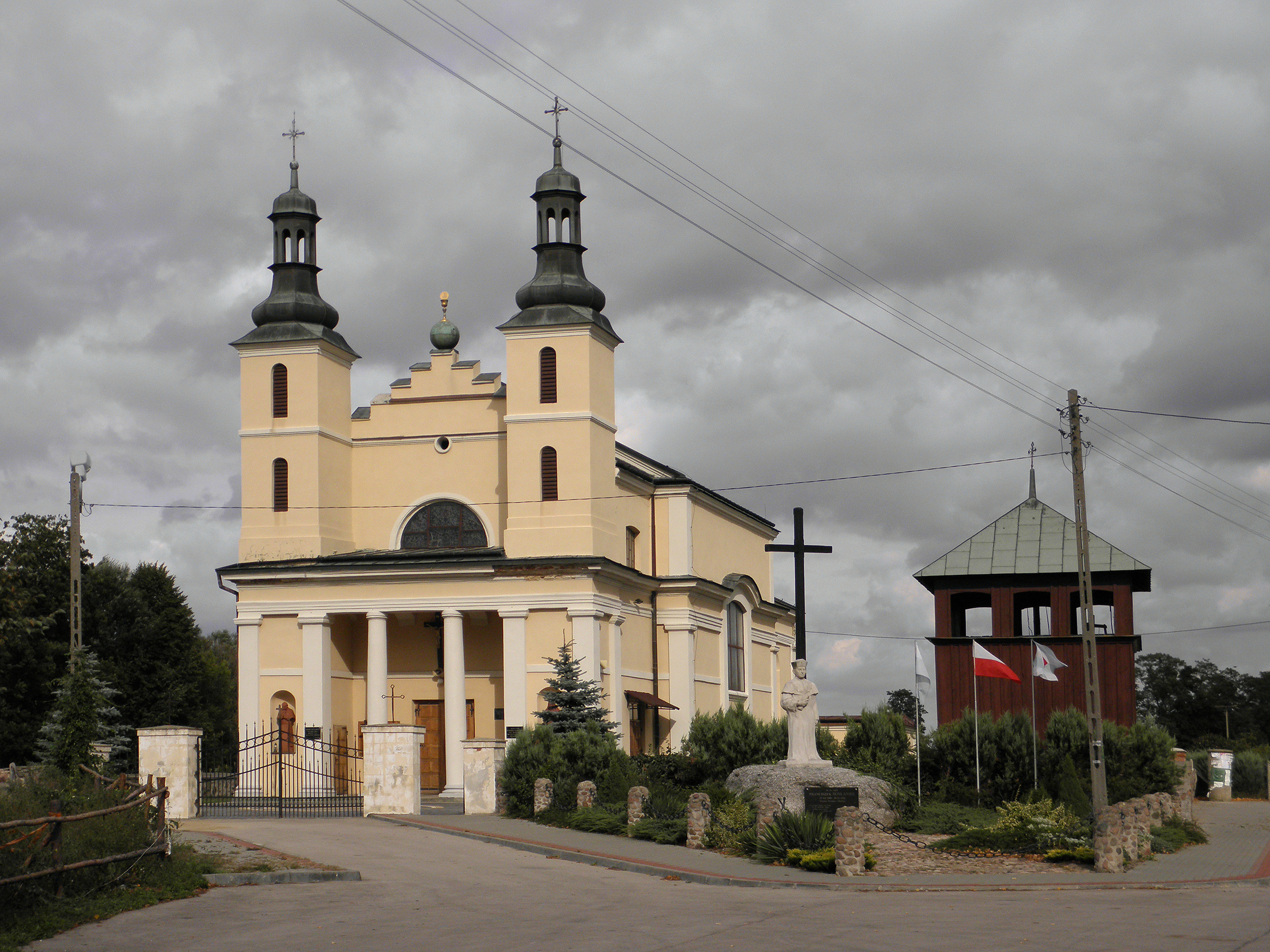 Wyśmierzyce - kościół p.w. Zwiastowania NMP.